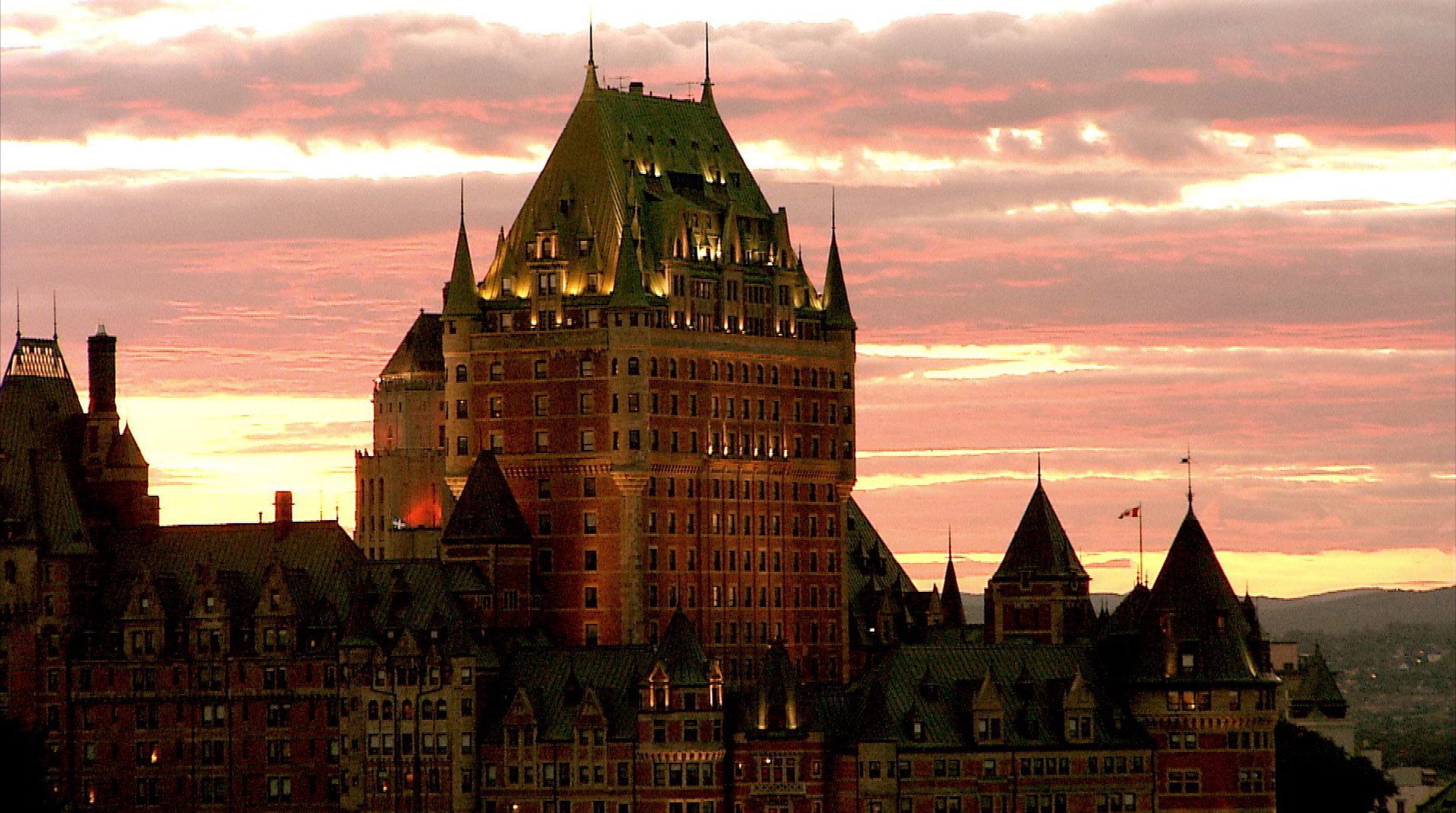 Le château Frontenac –Vieux-Québec / Old Quebec, ville de Québec / Quebec city(Québec, Canada)